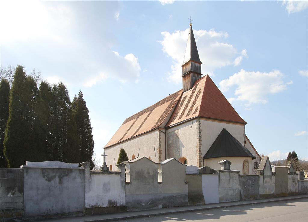 Kath. Filialkirche hl. Johann im Felde, Friedhof